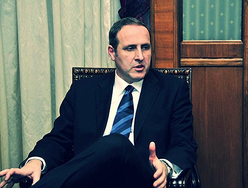 Predsjednik Liberalne partije, Andrija Popović